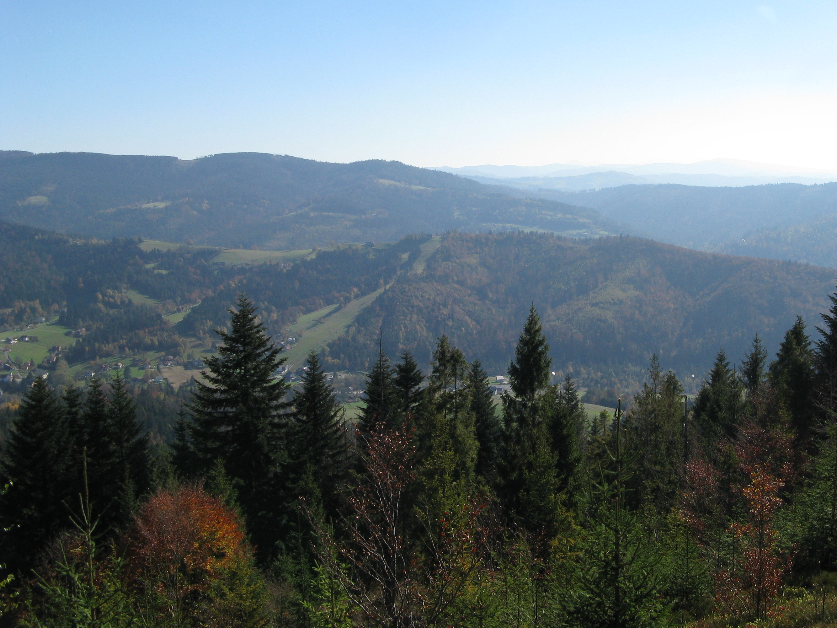 Cieńków Niżni (720 m n.p.m.) widziany z wierzchołka Czupla (882 m n.p.m.).